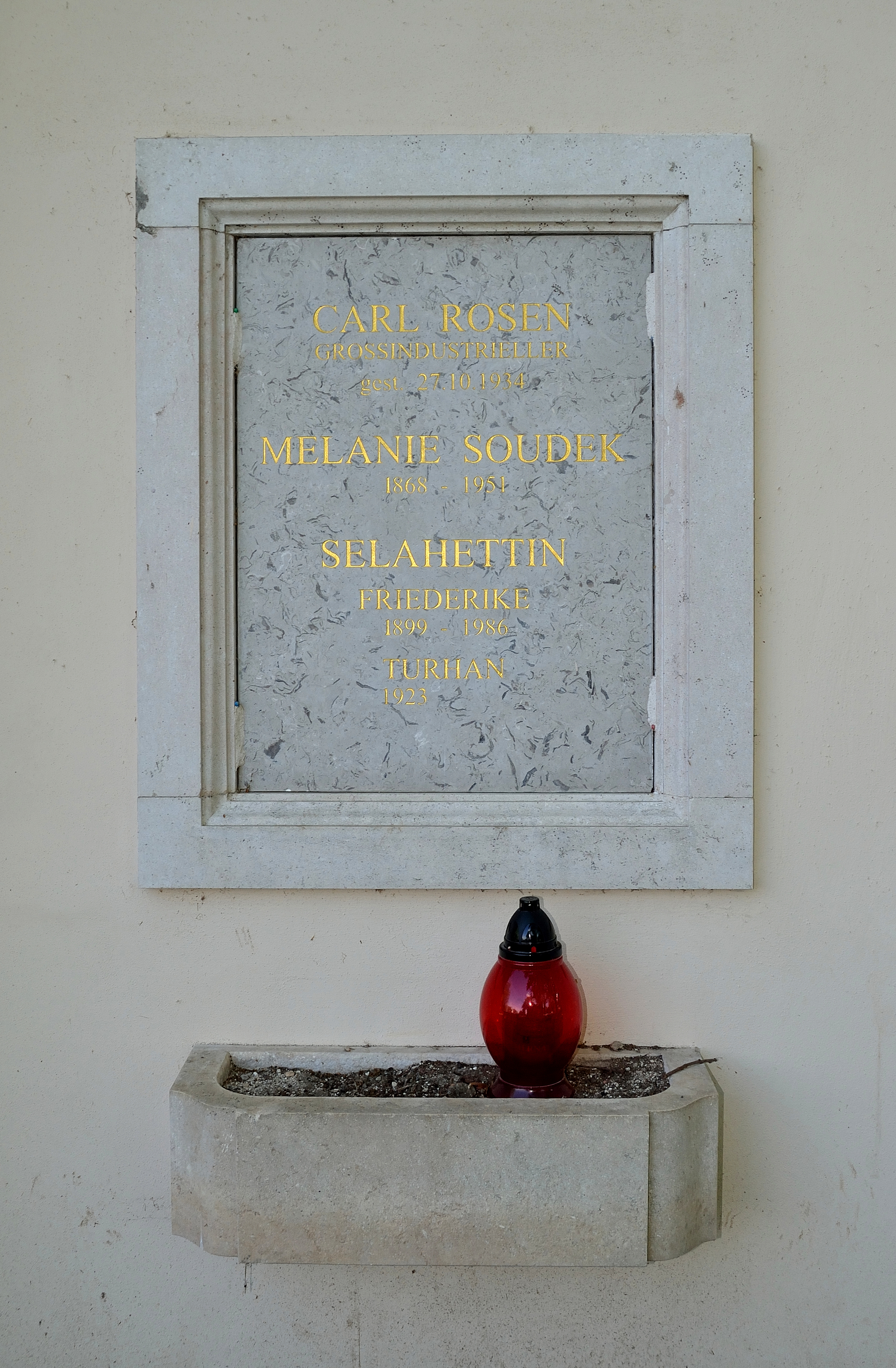 Urnennische Turhan Bey im Urnenhain der Feuerhalle in Simmering. Todesdatum noch nicht eingraviert.